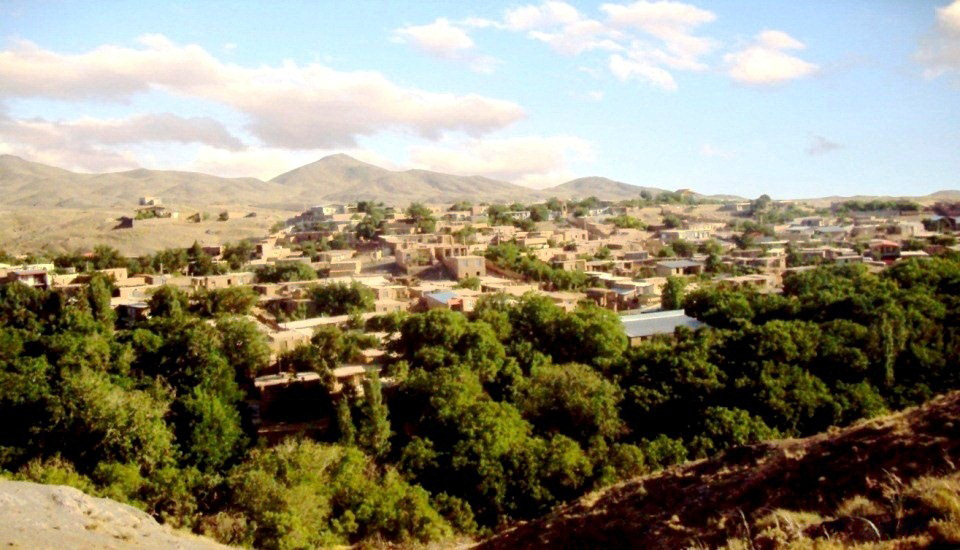 سراسرنمای روستای سنجگان